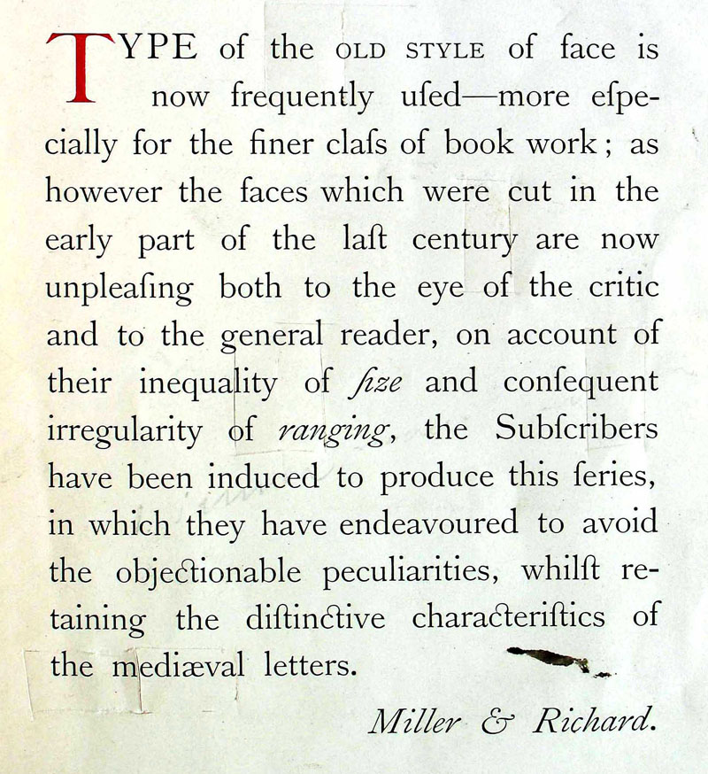 Mostra de la tipografia Old Style al catàleg de la fundició Miller & Richard